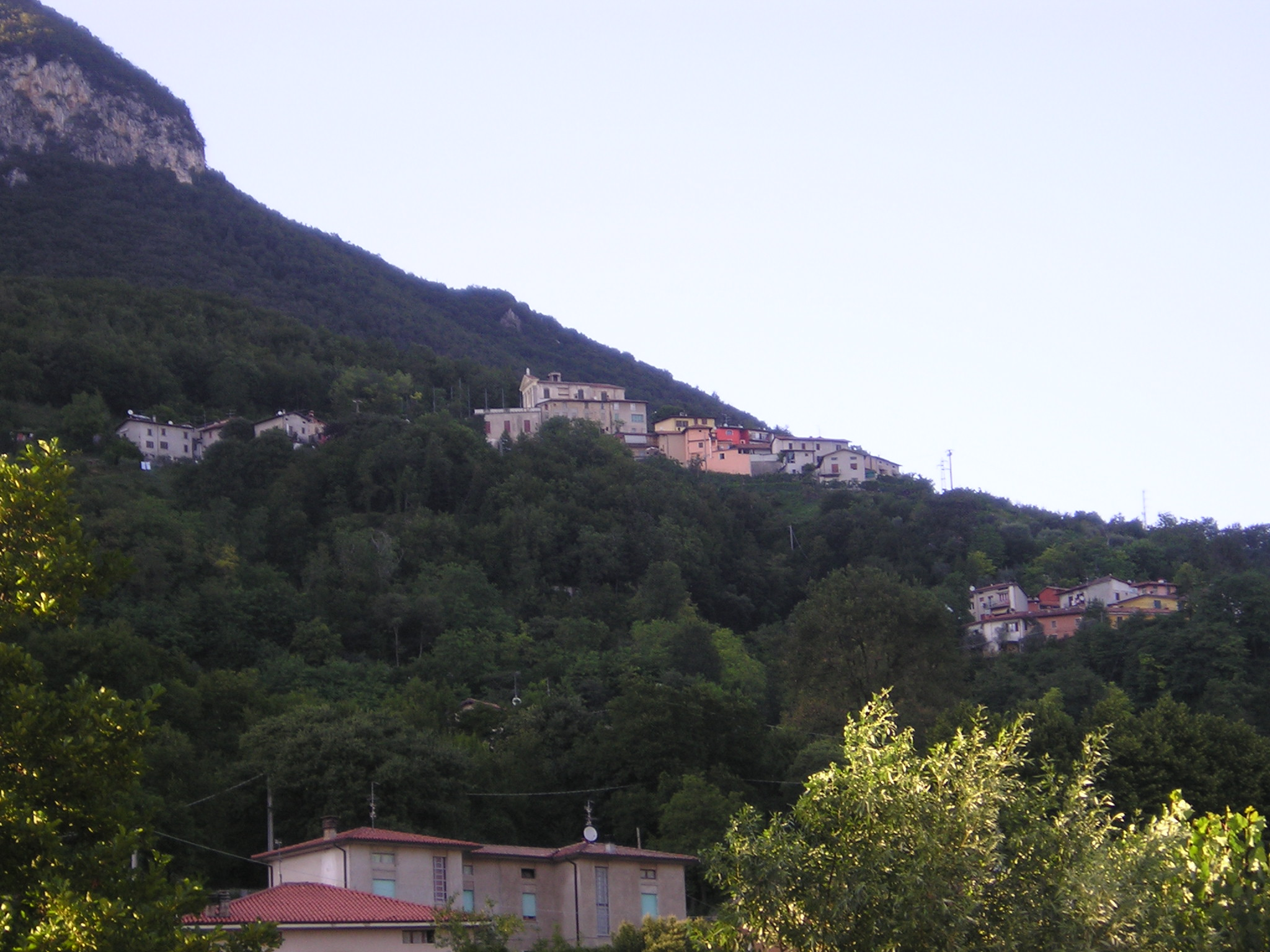 Bondone, frazione di Villanuova sul Clisi